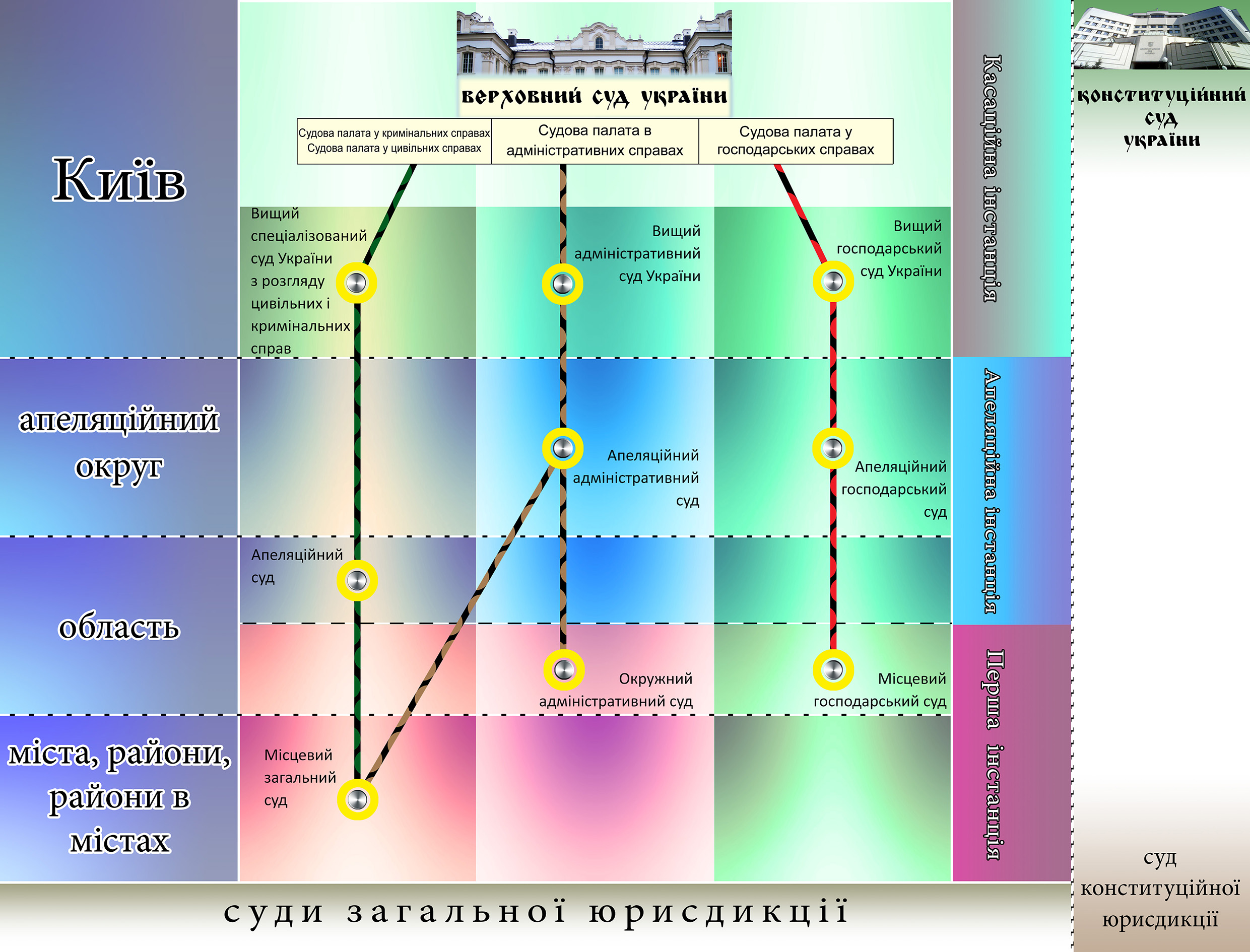 Судоустрій України: Схема судоустрою України станом на 2012 р. Актуальна до 30.09.2016 р.